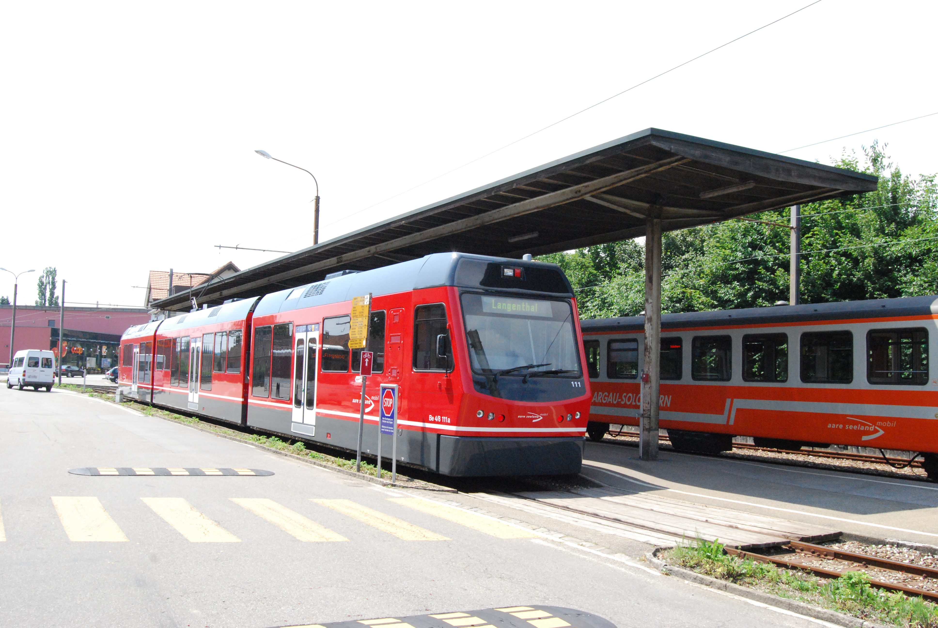 STAR BE 4/8 Gelenkstriebzug der ASM